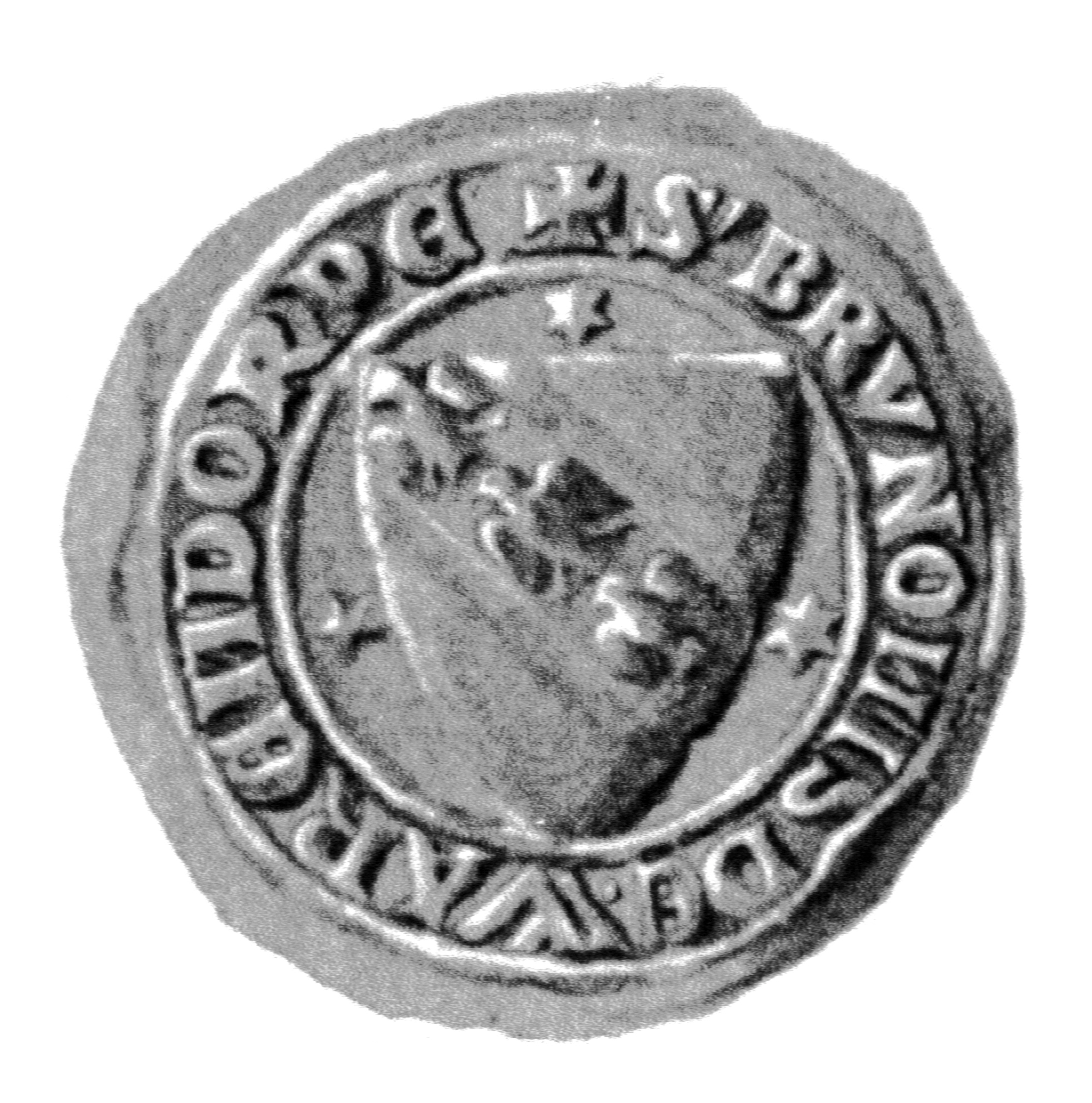 Siegel des Ratsmannes Bruno Warendorp. Das Siegel stammt aus der Zeit um 1408. Siehe Emil Ferdinand Fehling: Lübeckische Ratslinie, Nr. 396 (Bruno Warendorp).